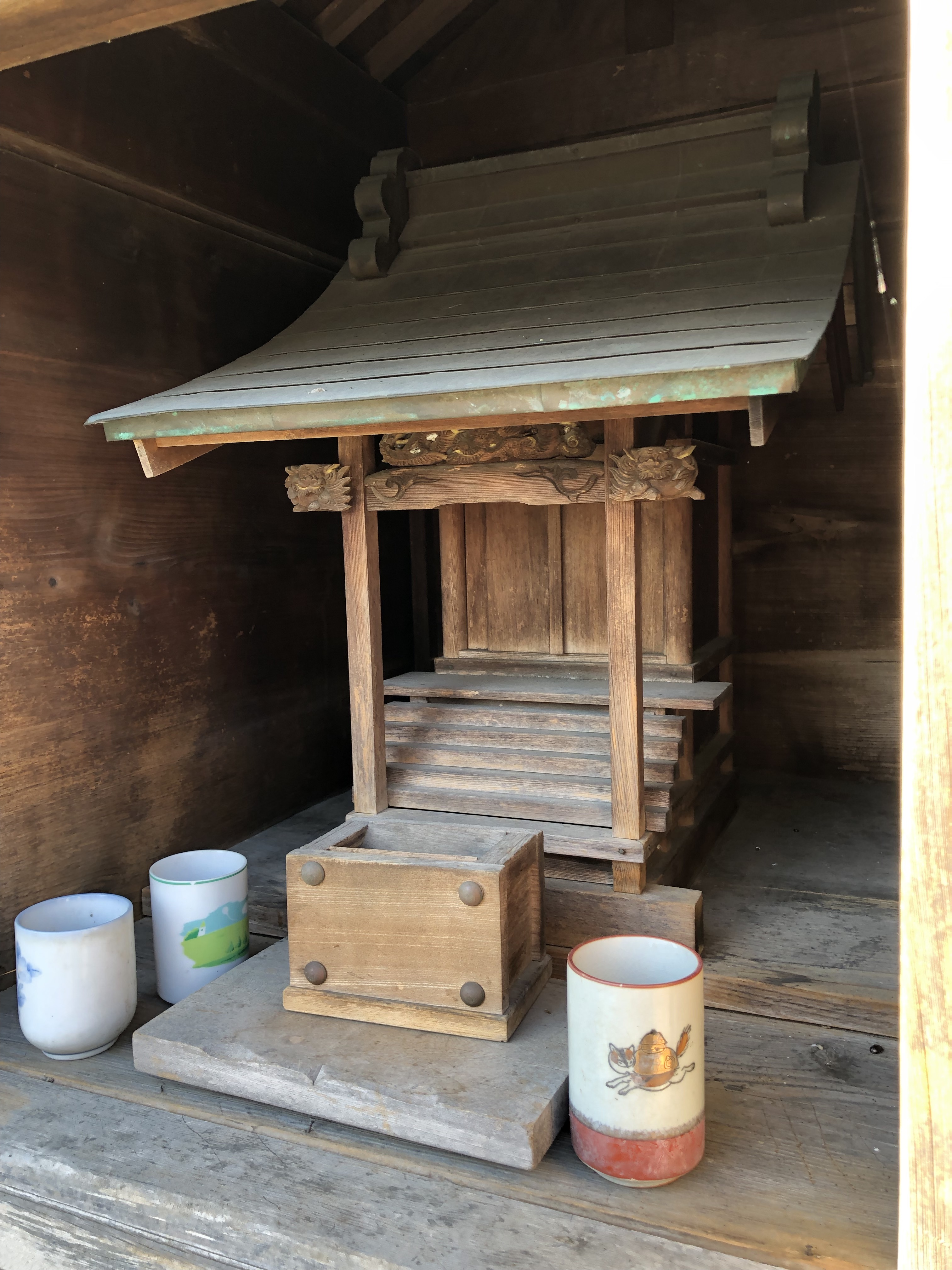 館林片町、お茶のおばあさんの祠（愛宕祠）内部 現在もいくつかのお茶碗が奉納されている